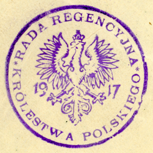 Stempel złożony na akcie Rady Regencyjnej przekazania władzy Józefowi Piłsudskiemu